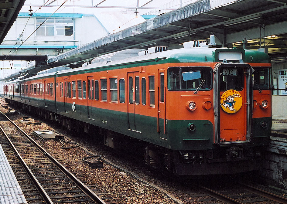 JR西日本 臨時快速 「スーパーラビット号」